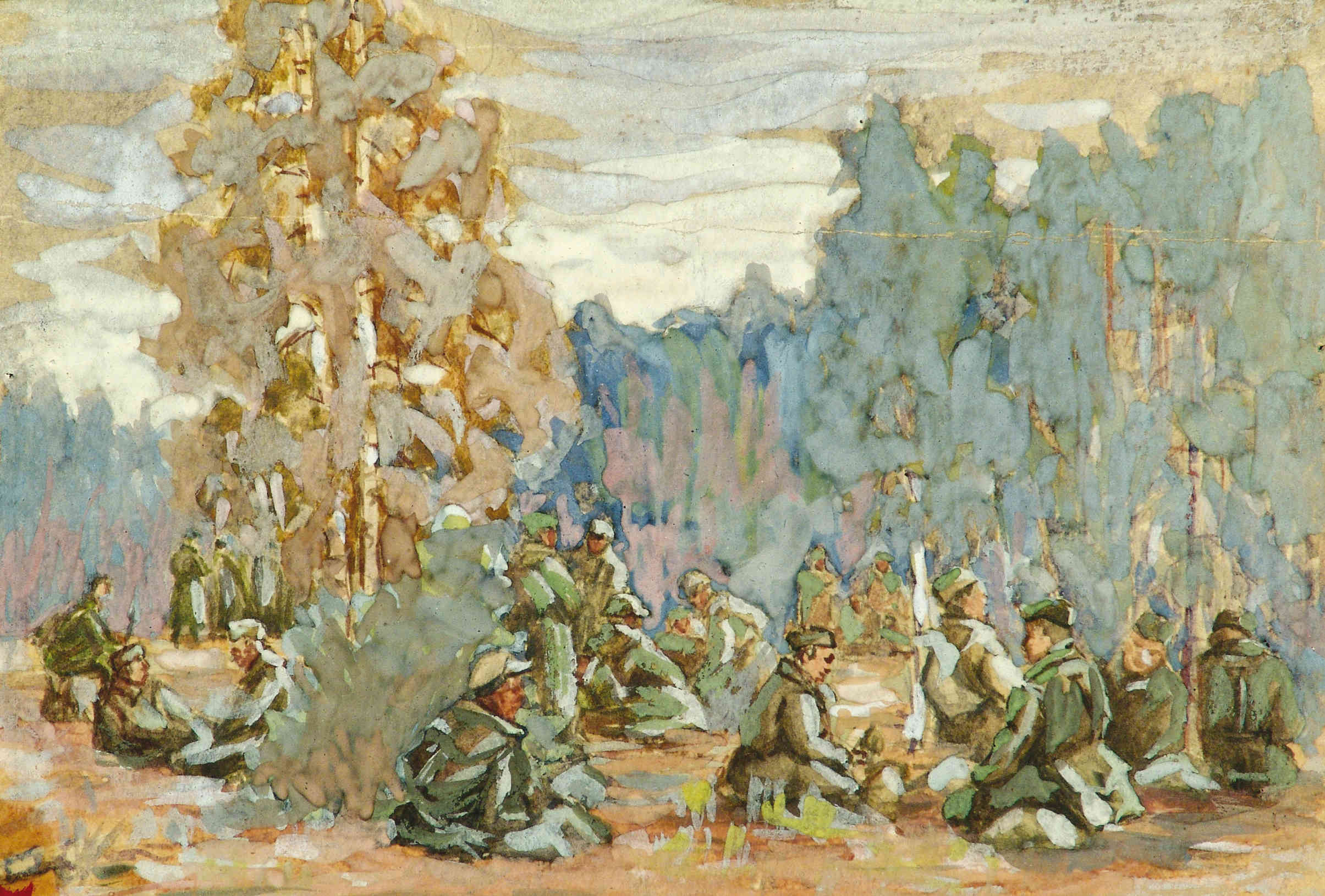 Павел Нічыпаравіч Гаўрыленка. На прывале. Папера, гуаш. 14,5×20,5 см. Нацыянальны мастацкі музей Рэспублікі Беларусь